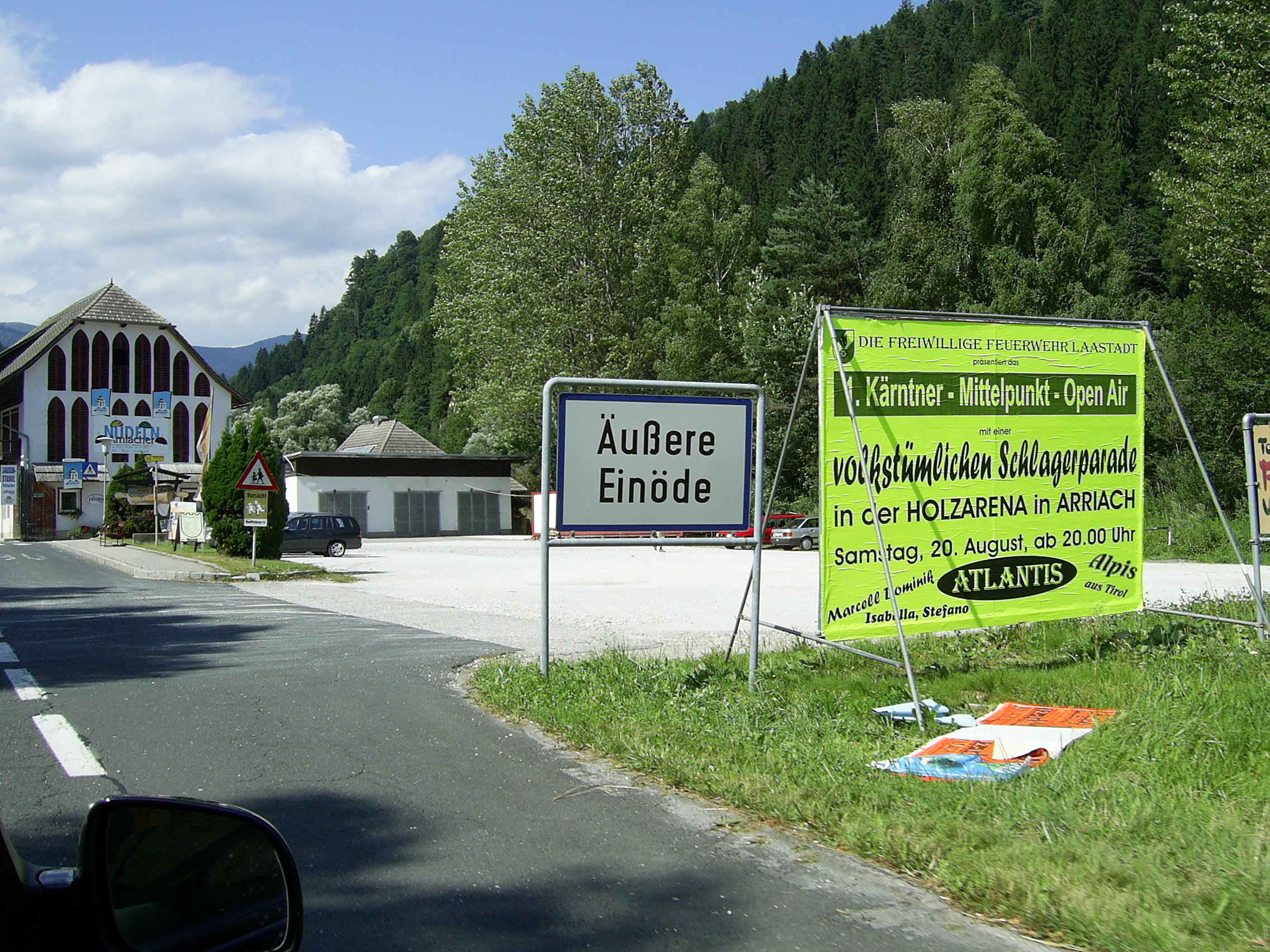 Ortschild „Äußere Einöde“ in Österreich-Kärnten.